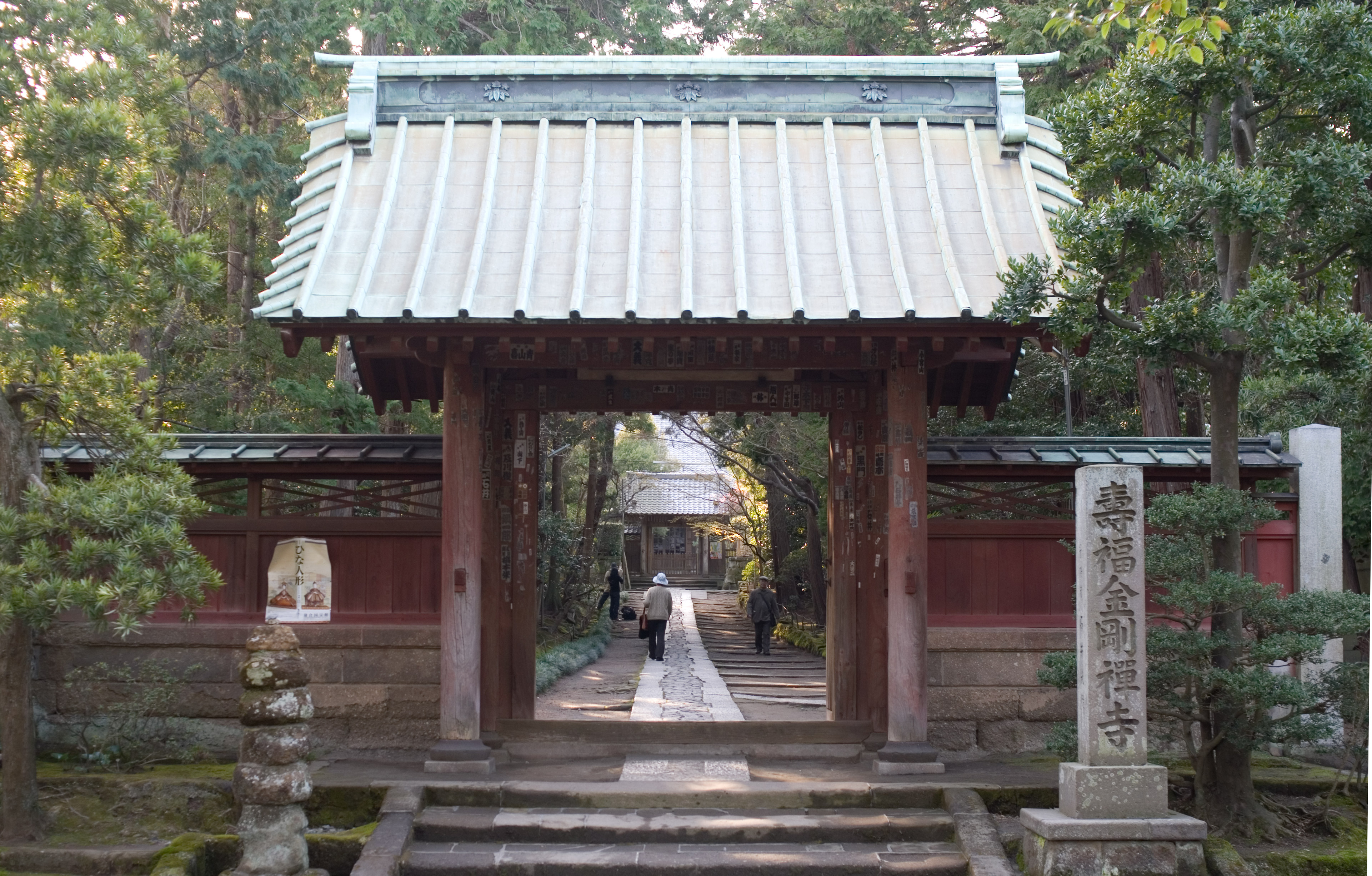 Jufuku-ji temple, Kamakura. Main gate